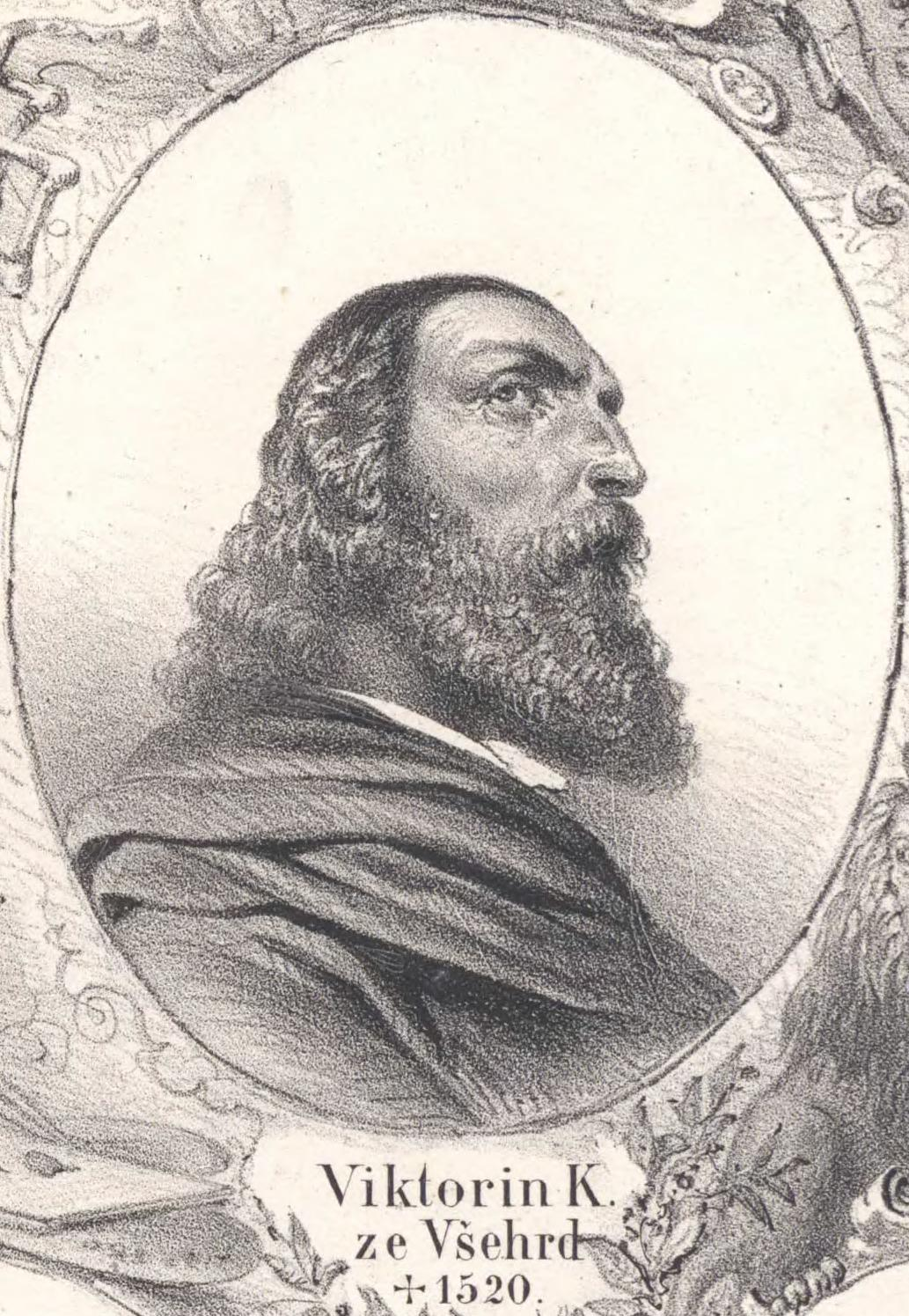 Portrait of Viktorin Kornel ze Všehrd (1460 - 1520), Czech lawyer.